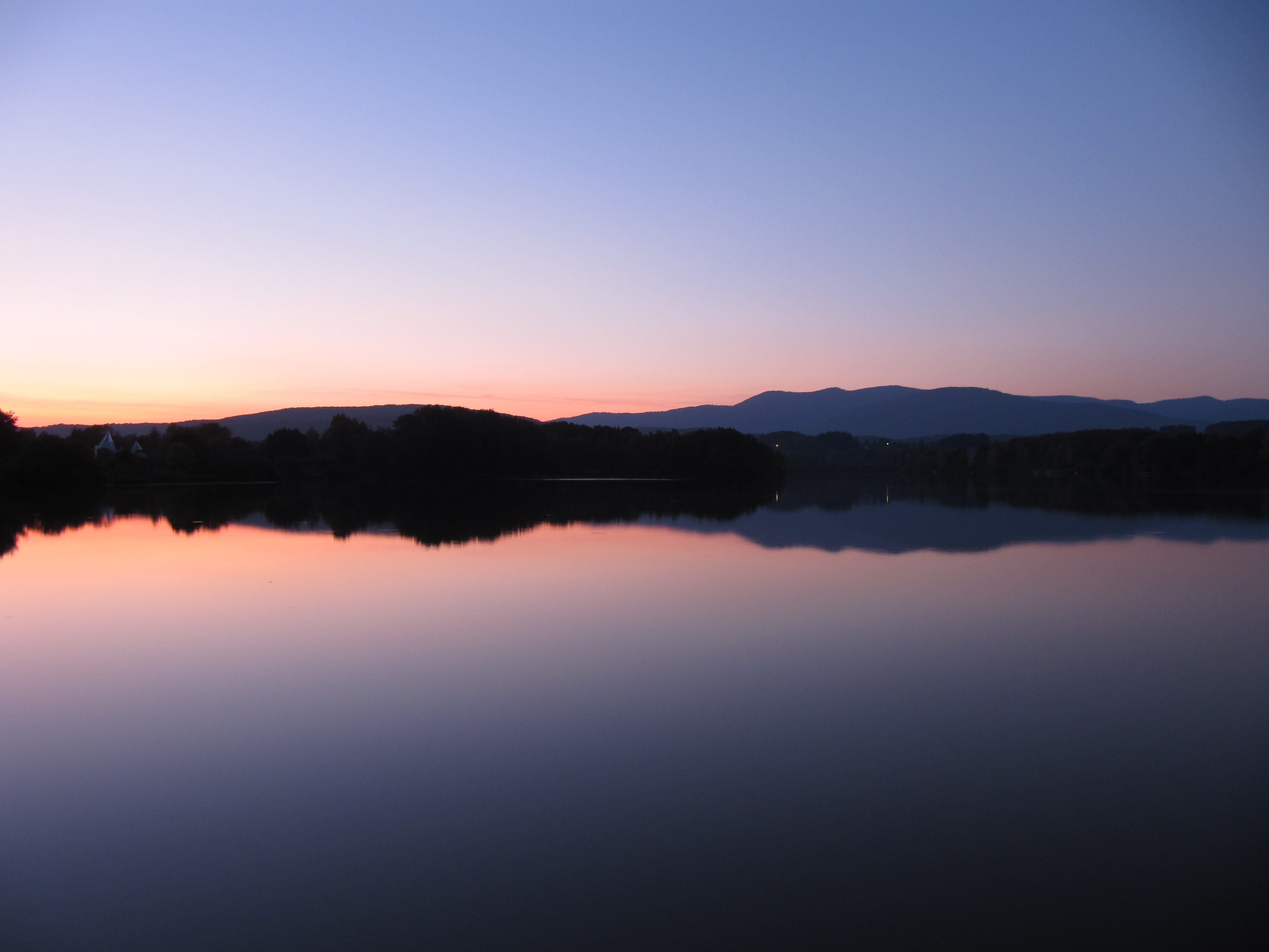 L'étang de la Véronne, appareil photo posé sur la barrière, juste à côté du parking.